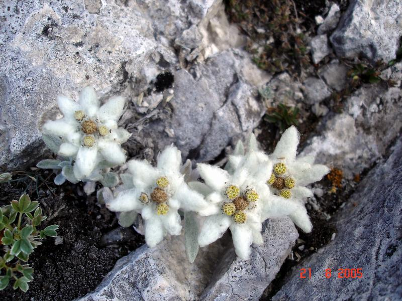 Edelweiss - Pirin mountain in Bulgaria